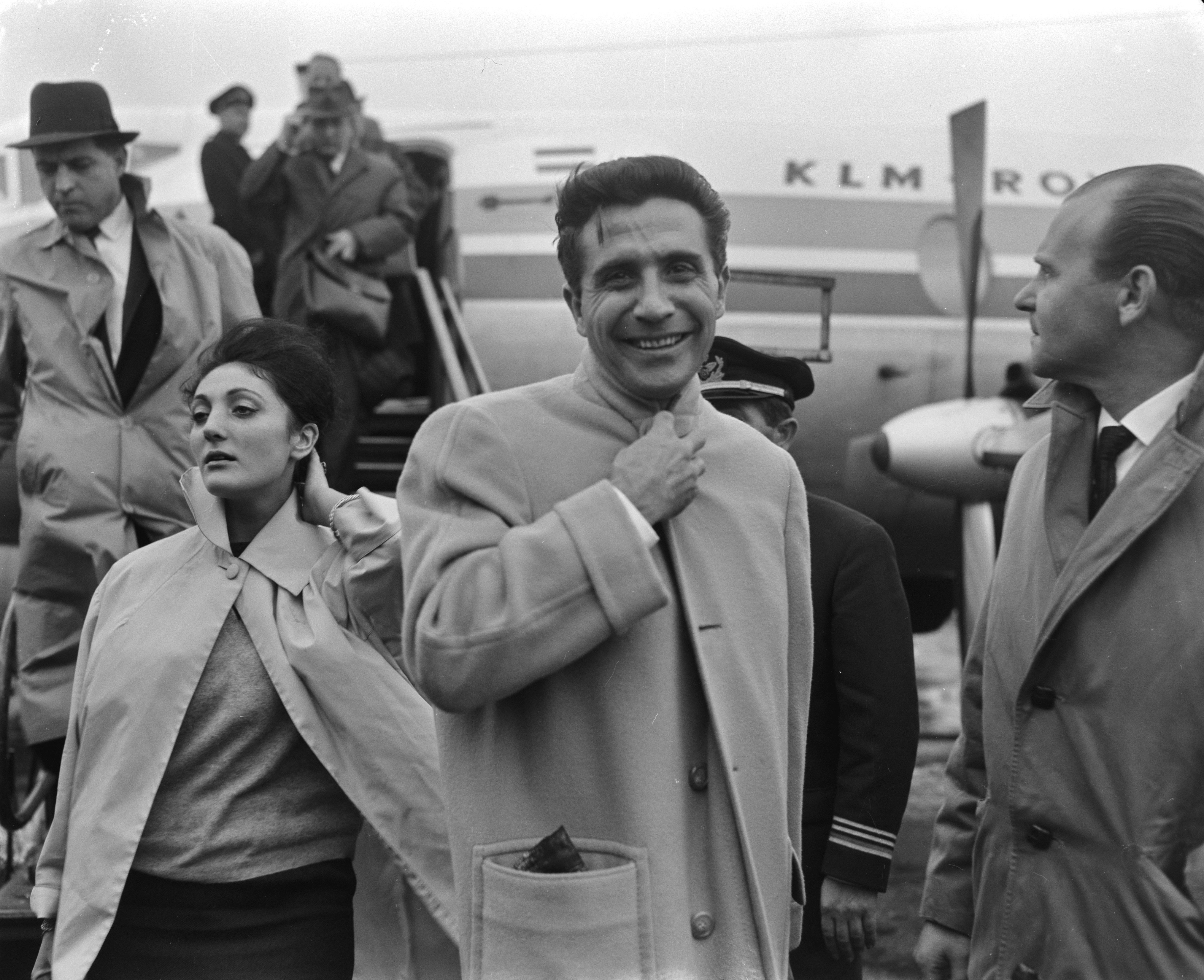 Collectie / Archief : Fotocollectie Anefo Reportage / Serie : [ onbekend ] Beschrijving : Aankomst Gilbert Bécaud op Schiphol Datum : 2 november 1961 Locatie : Noord-Holland, Schiphol Trefwoorden : aankomsten Persoonsnaam : Bécaud, Gilbert Fotograaf : Bilsen, Joop van / Anefo Auteursrechthebbende : Nationaal Archief Materiaalsoort : Negatief (zwart/wit) Nummer archiefinventaris : bekijk toegang 2.24.01.04 Bestanddeelnummer : 913-1299